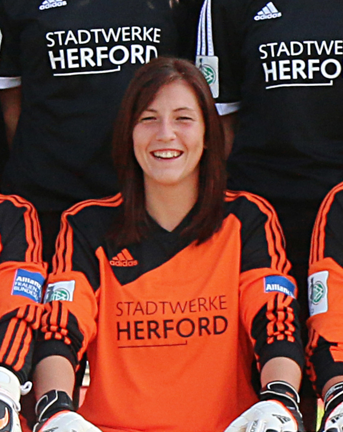 Herforder SV Borussia Friedenstal Team 2014/2015